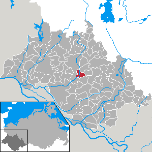 Kuhstorf in Mecklenburg-Vorpommern - district Ludwigslust